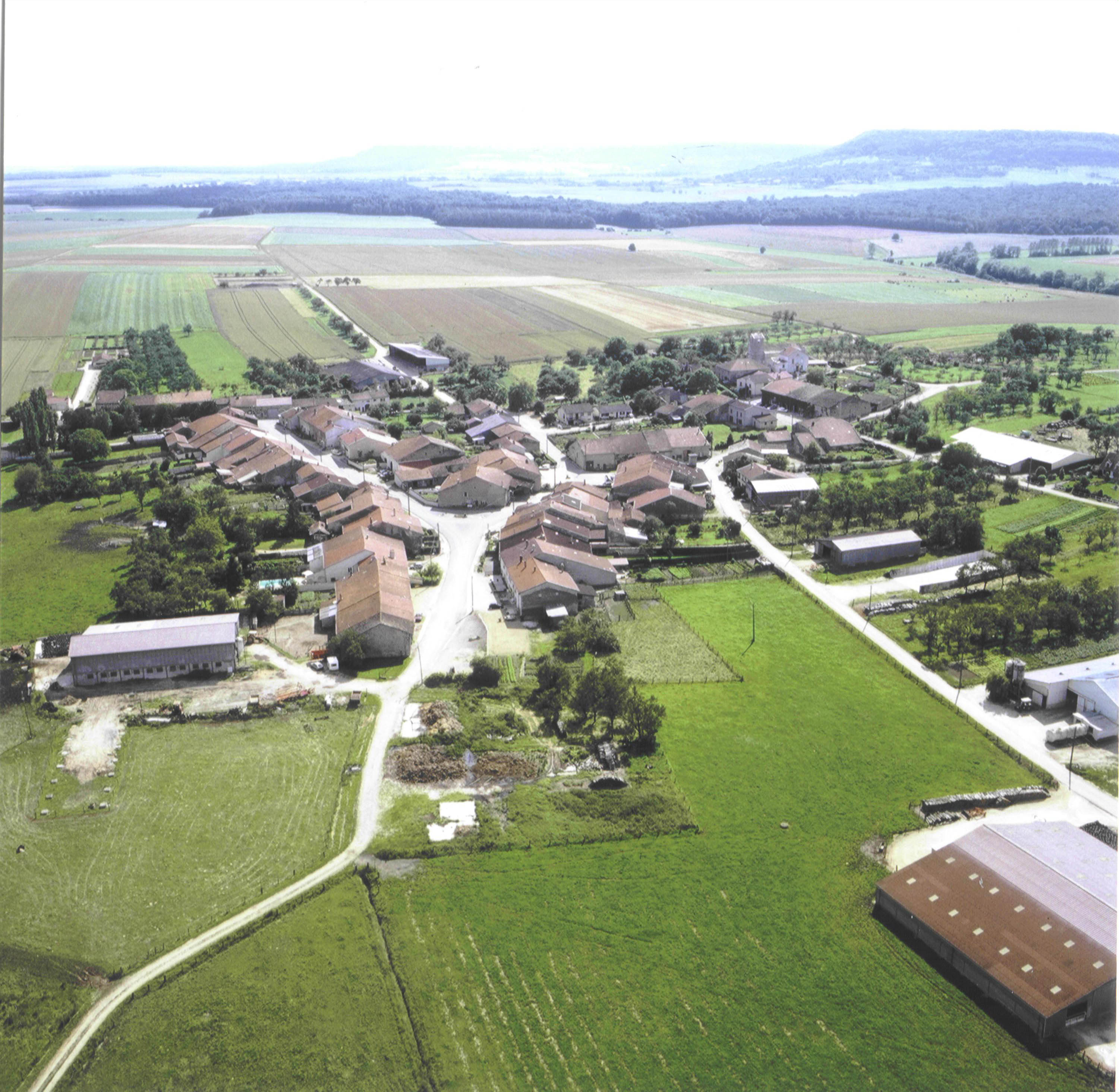 Village de Bagneux 54 Meuthe et moselle